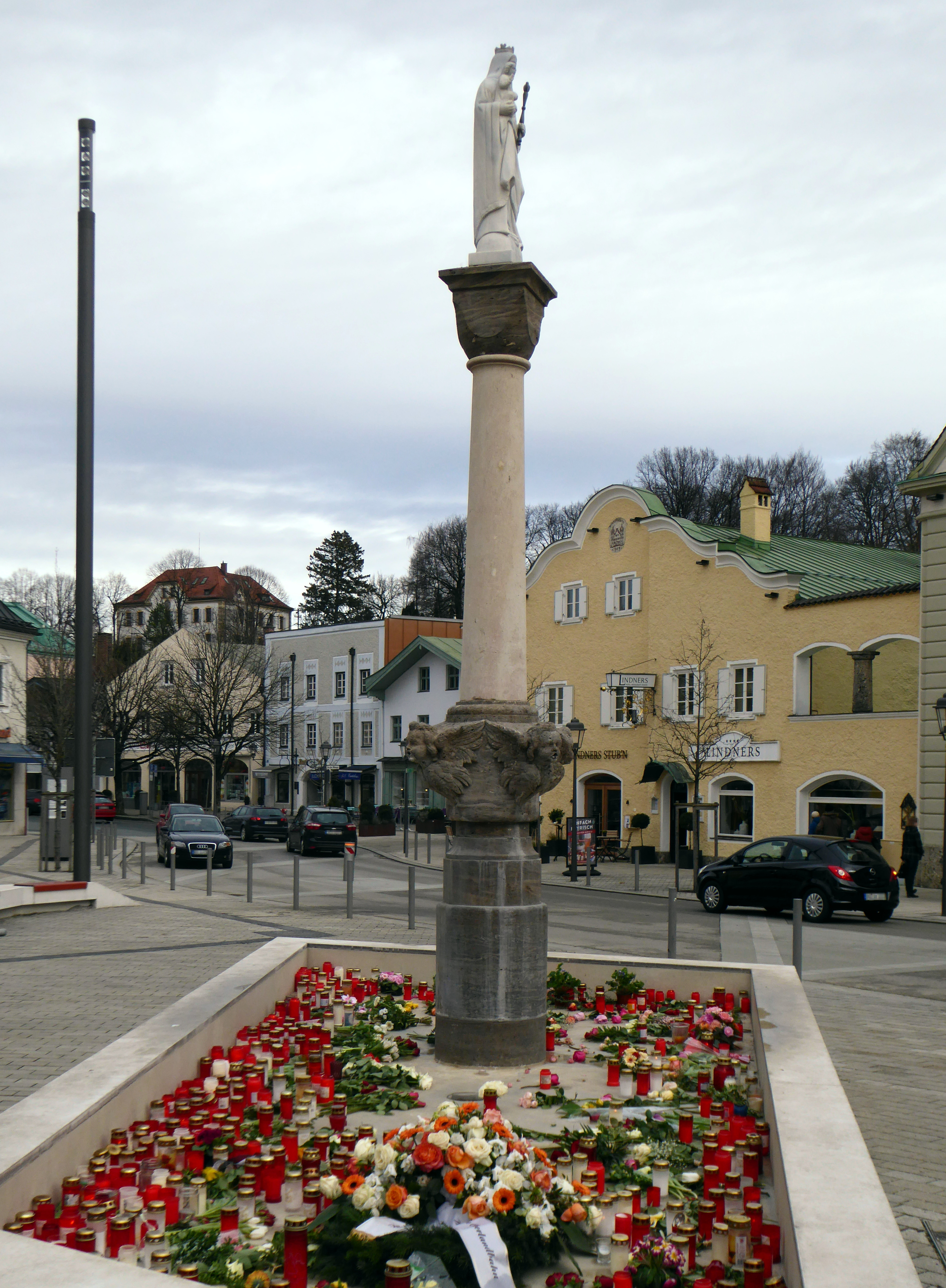 Zum Zeichen der Trauer um die Opfer des Zugunglücks vom 2016-02-09 stellen die Bürger von Bad Aibling Lichter an der Mariensäule auf.